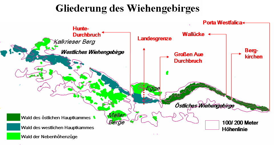 Naturräumliche und topographische Gliederung des Wiehengebirges in den Ländern Nordrhein-Westfalen und Niedersachsen.